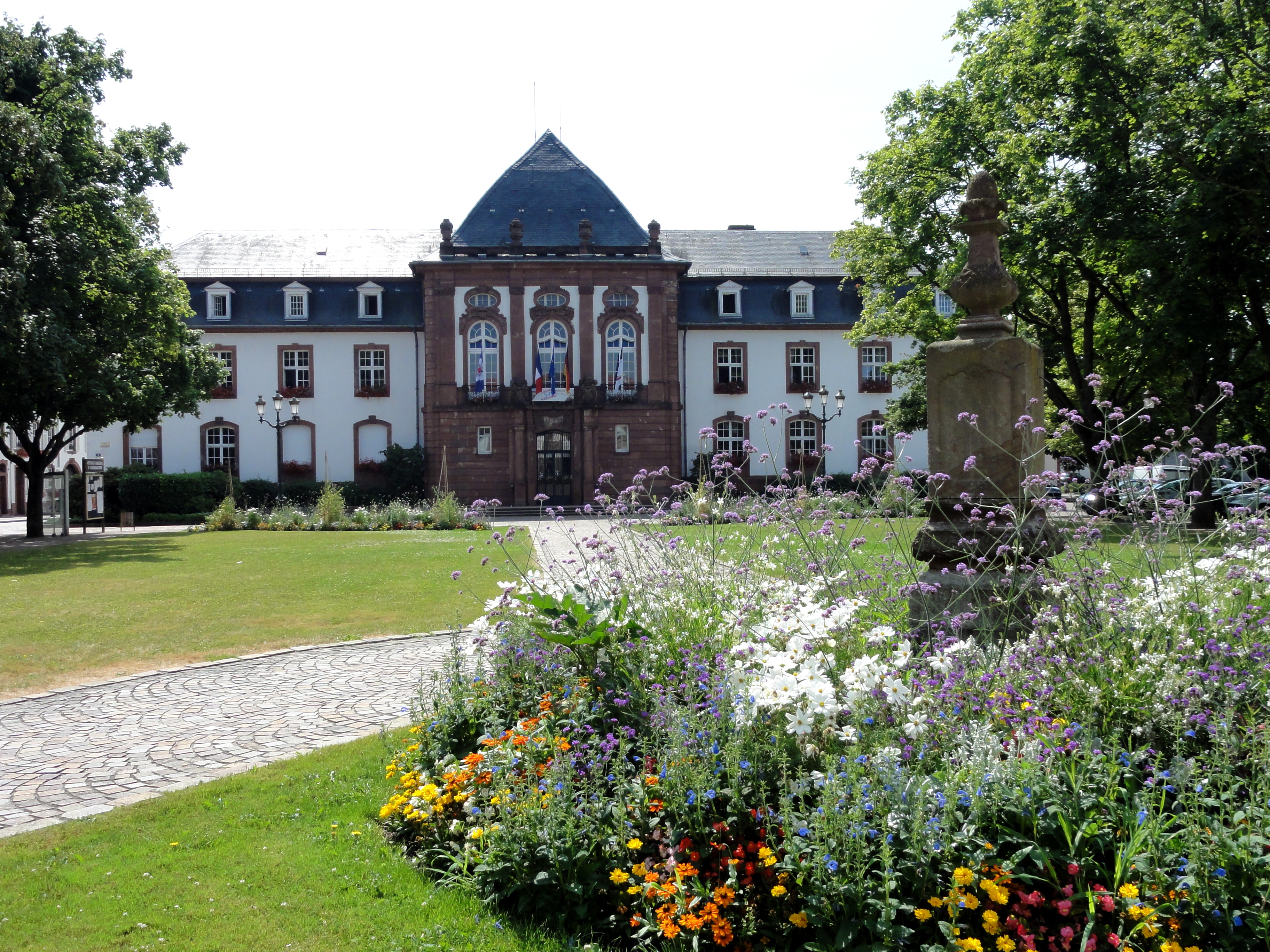 Alsace, Bas-Rhin, Haguenau, Hôtel de Ville (1908), place du Général De Gaulle